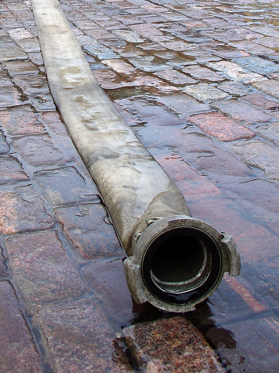 Firehose.jpg